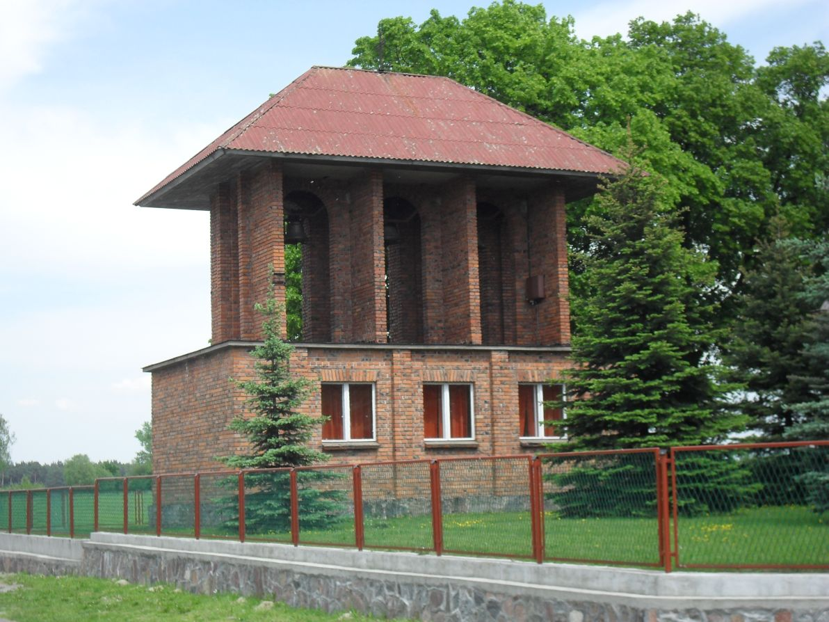 Dzwonnica przy kościele w Polskich Łąkach.